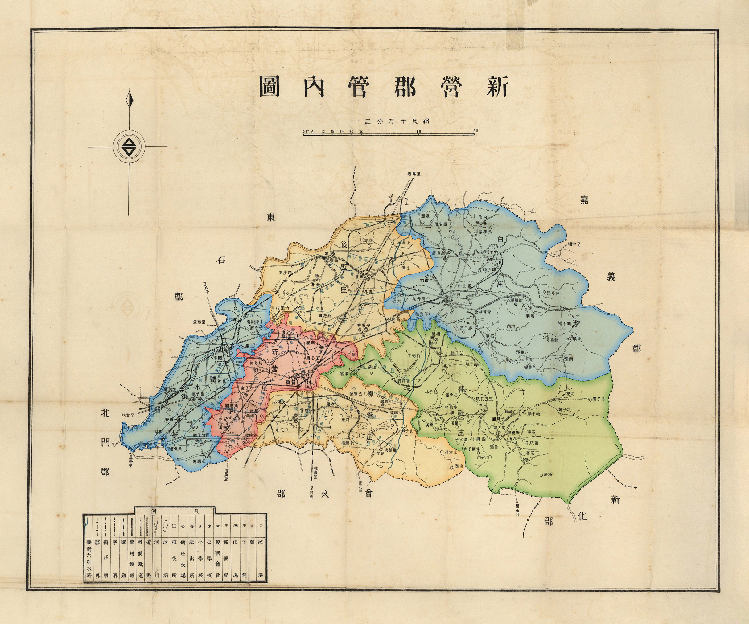 中文（台灣）: 臺南州新營郡轄下有新營街、鹽水街、白河街、柳營庄、後壁庄、番社庄